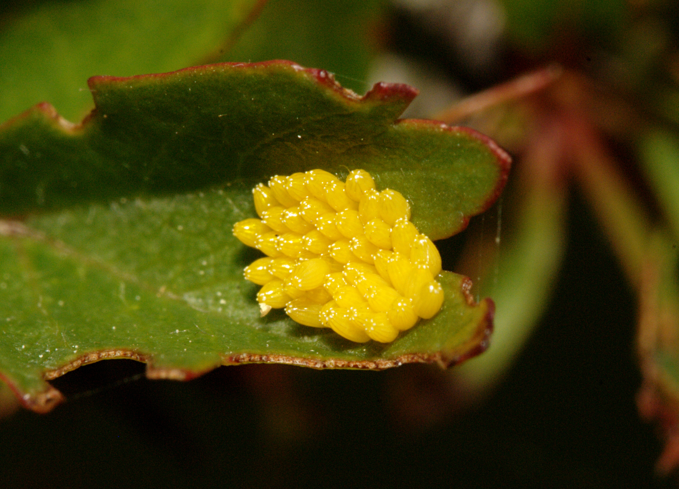 Aporia crataegi, eggs on Crataegus